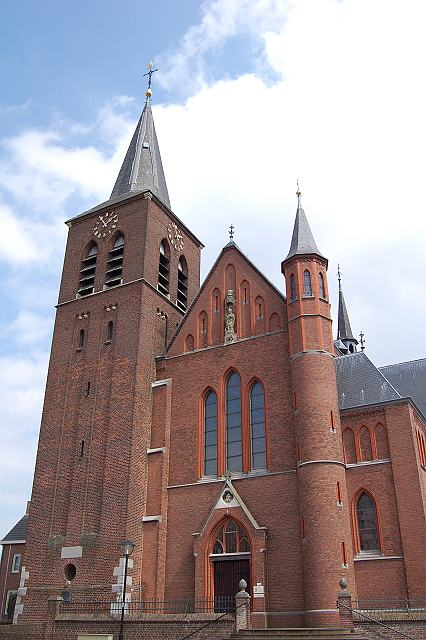 Foto is door de gebruiker zelf gemaakt.